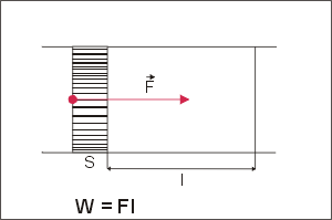 Pohyblivý píst